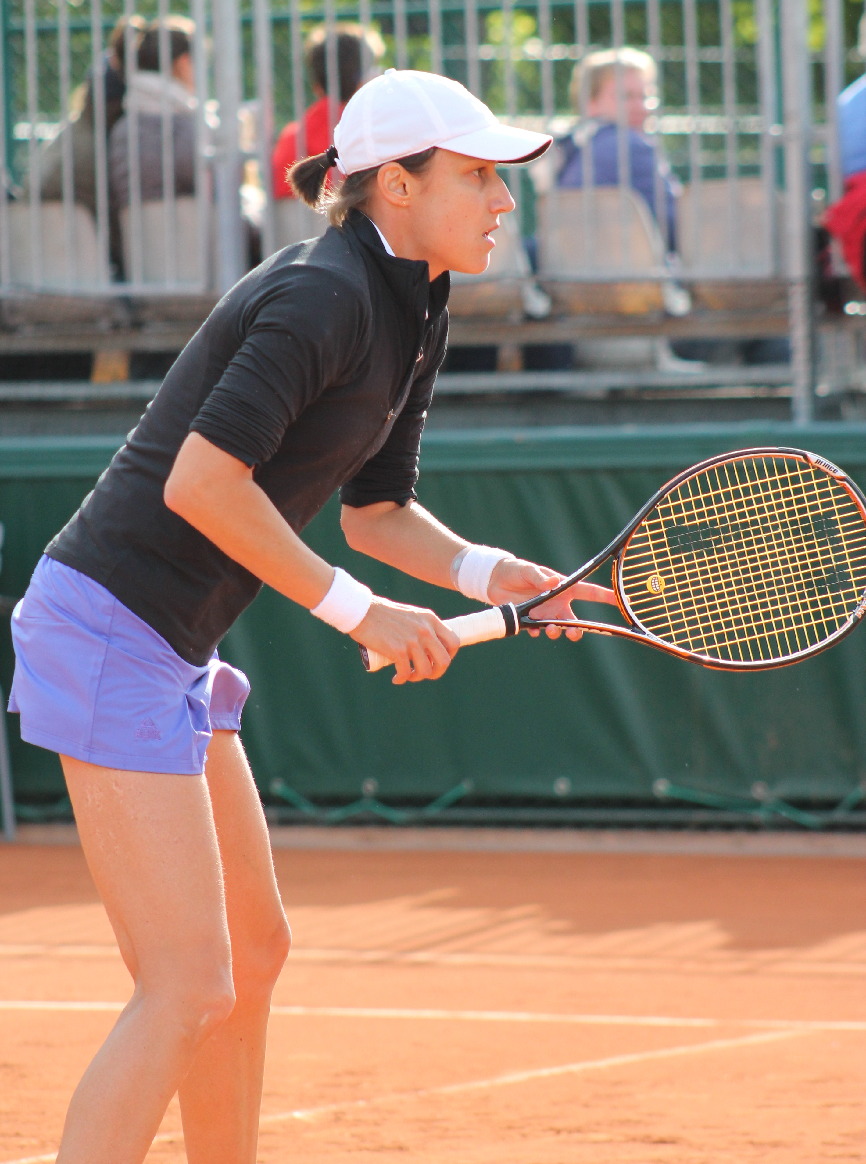 Srebotnik RG13 (2)